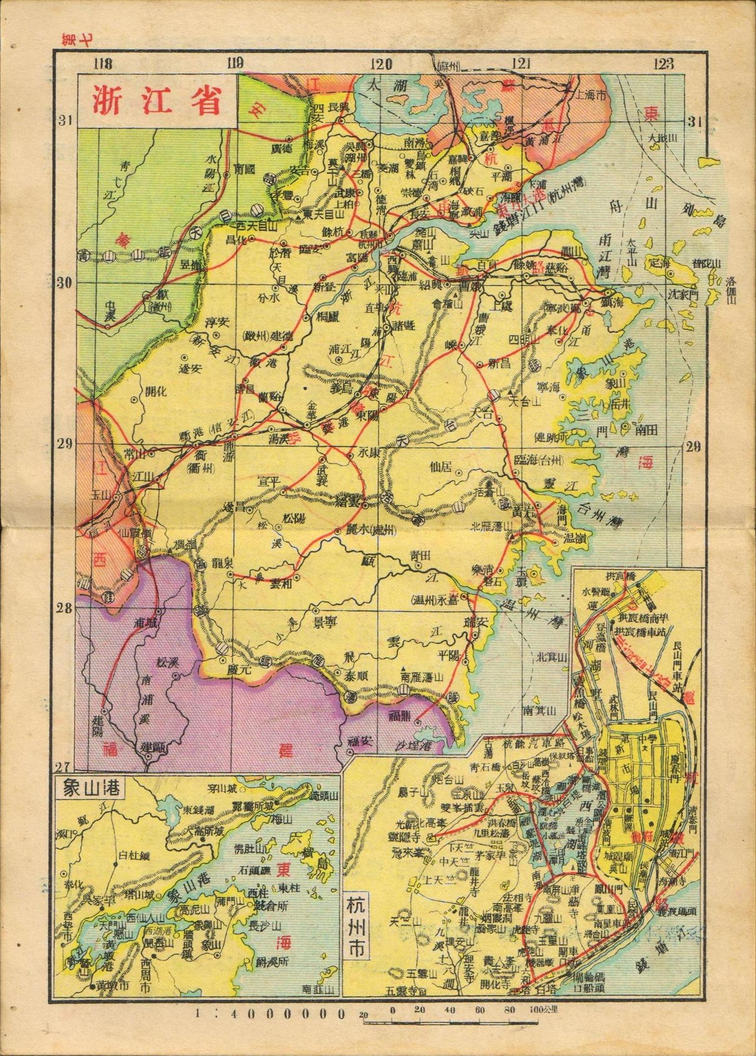 亚新地学社1936年《袖珍中华全图》浙江省